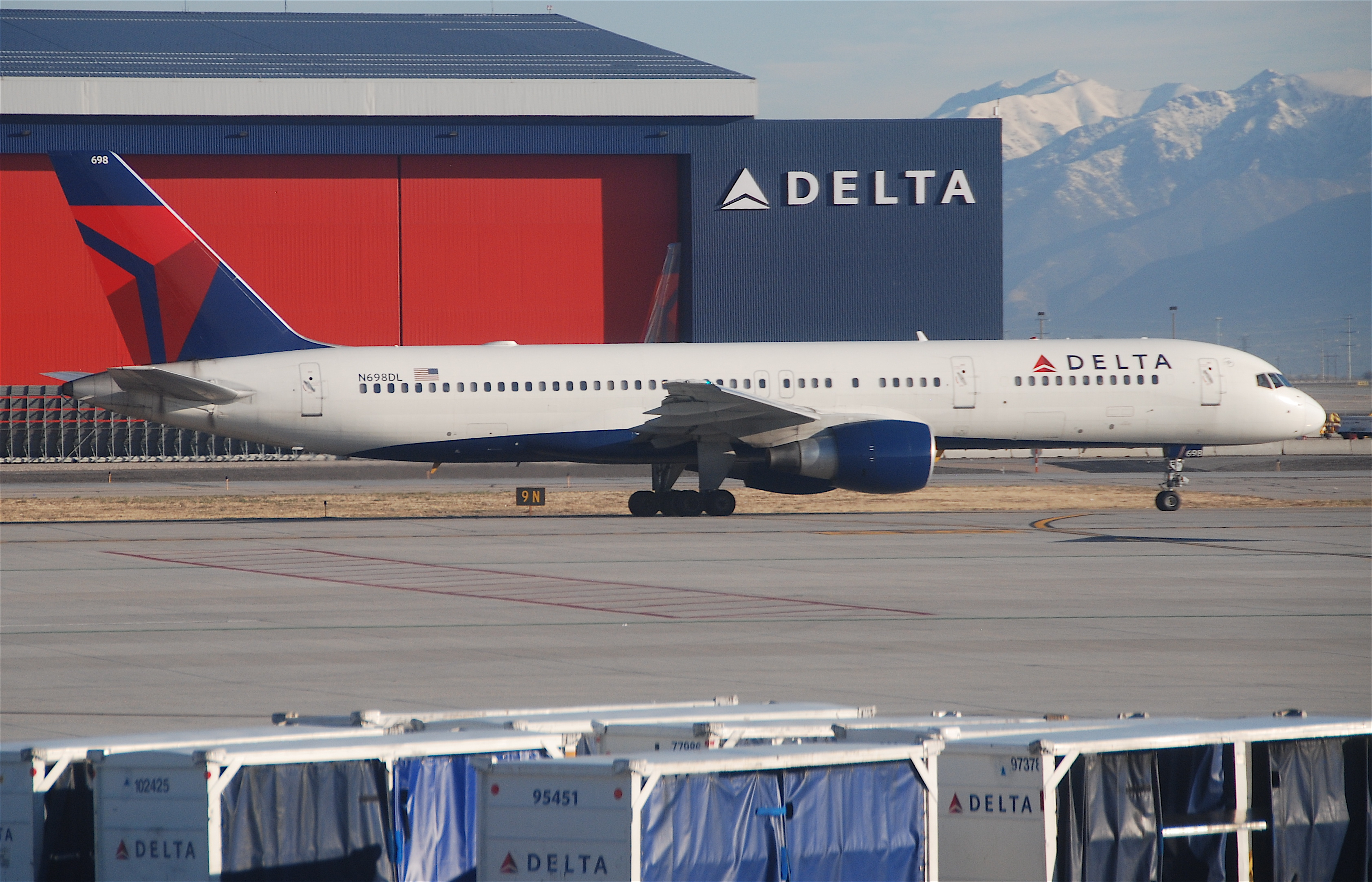 Delta Air Lines Boeing 757-232; N698DL@SLC;09.10.2011/621af